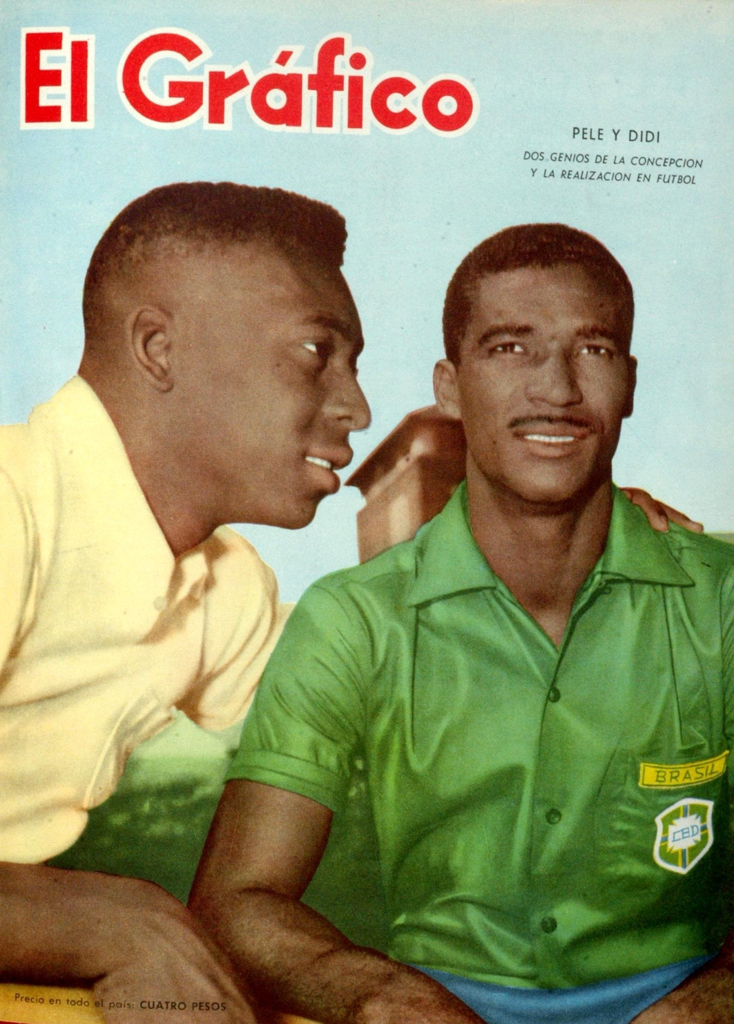 El Grafico del 09 de Abril de 1959. Edicion 2065